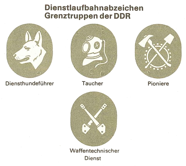 Dienstlaufbahnabezeichen der Grenztruppen der DDR